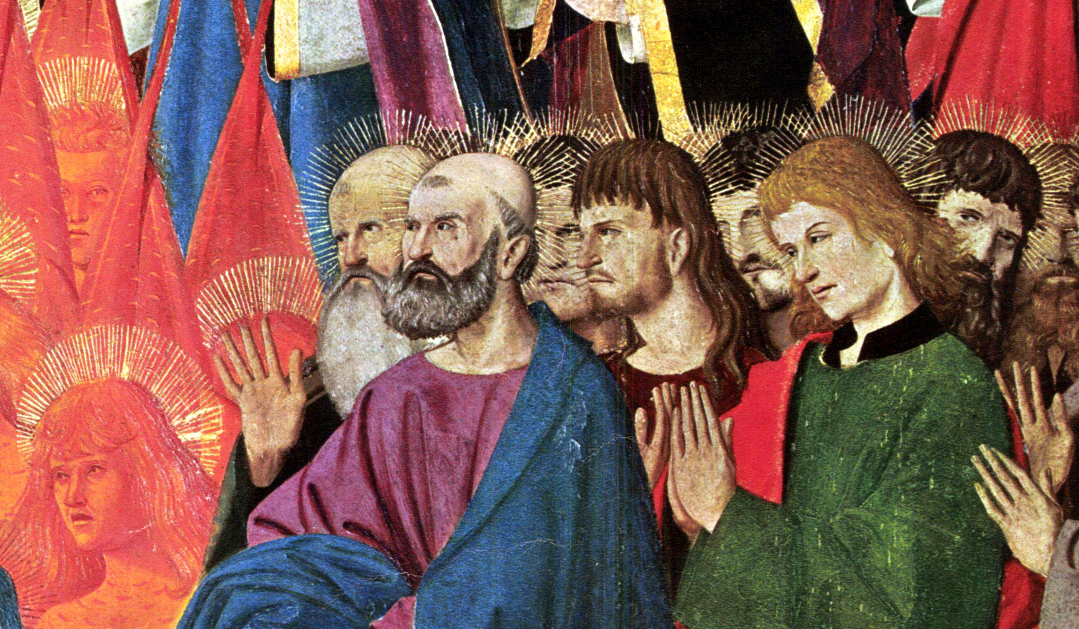 Detalhe da Coroação da Virgem